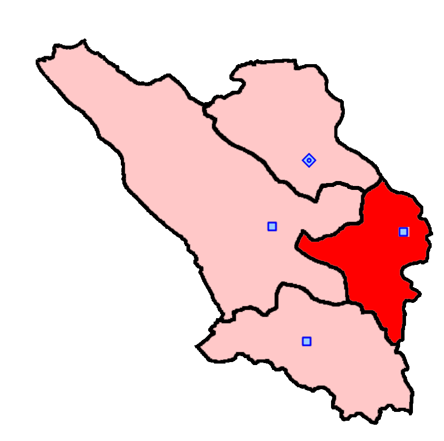 حوزهٔ انتخاباتی بروجن برای انتخابات مجلس شورای اسلامی